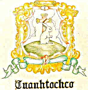 Escudo del municipio de Hutausco